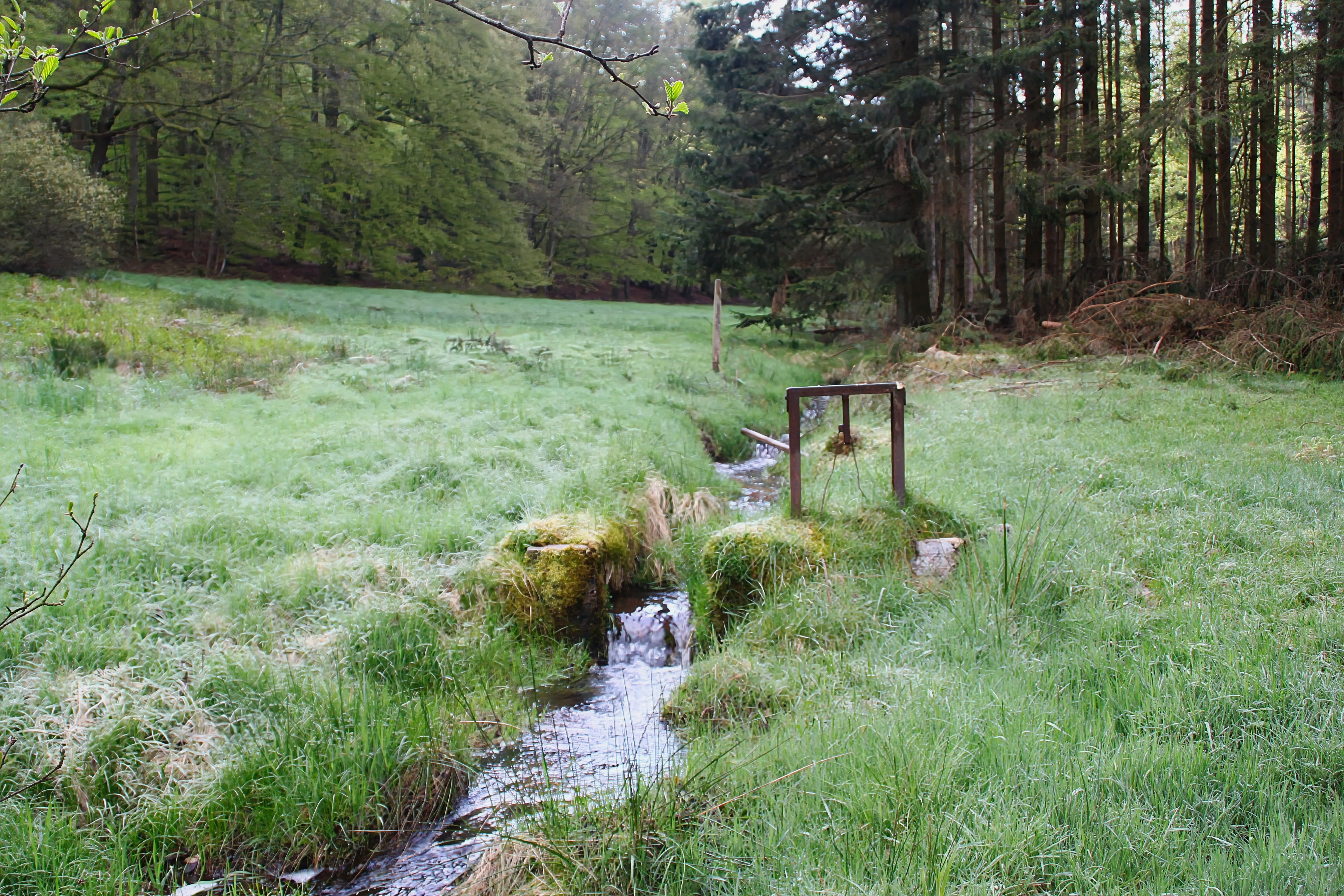 Der Edelbach unterhalb seiner Quelle bei Edelbach im Landkreis Aschaffenburg, Bayern